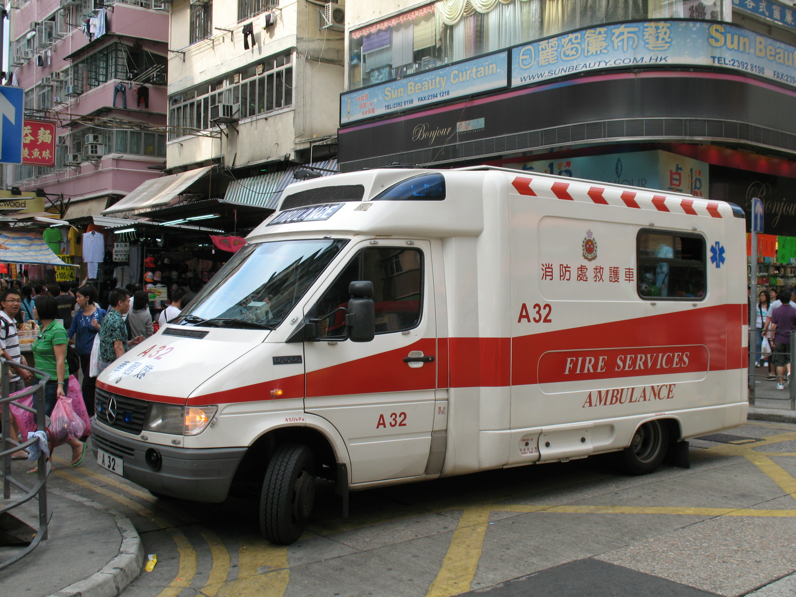 中文（香港）: 服役於1997年的平治凌特414型救護車，全車配備英國UVG型號救護車車身，成為1997年7月1日回歸祖國及香港特區成立後的主力車種之一。